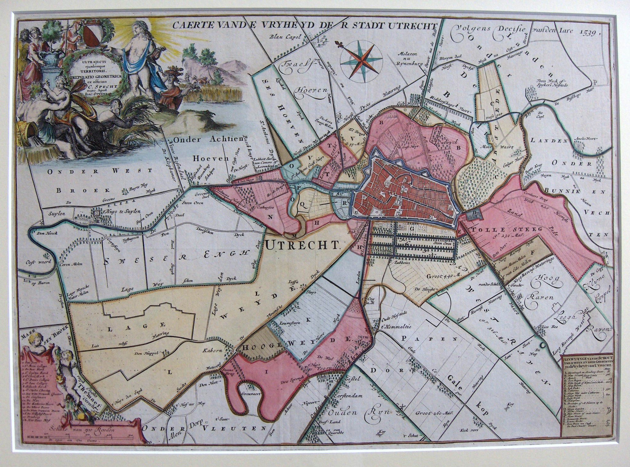 Kaart uit circa 1708 met de stadsvrijheid van Utrecht. Kaart is gebaseerd op besluit uit 1539 van Maria van Hongarije. Deze afbeelding betreft een ingekleurde versie. Een andere versie is hier te vinden.